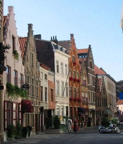 Brugge, Dweersstraat, foto gemaakt en ter beschikking gesteld voor vrij gebruik door Gebruiker:Ellywa Categorie:Afbeelding Brugge